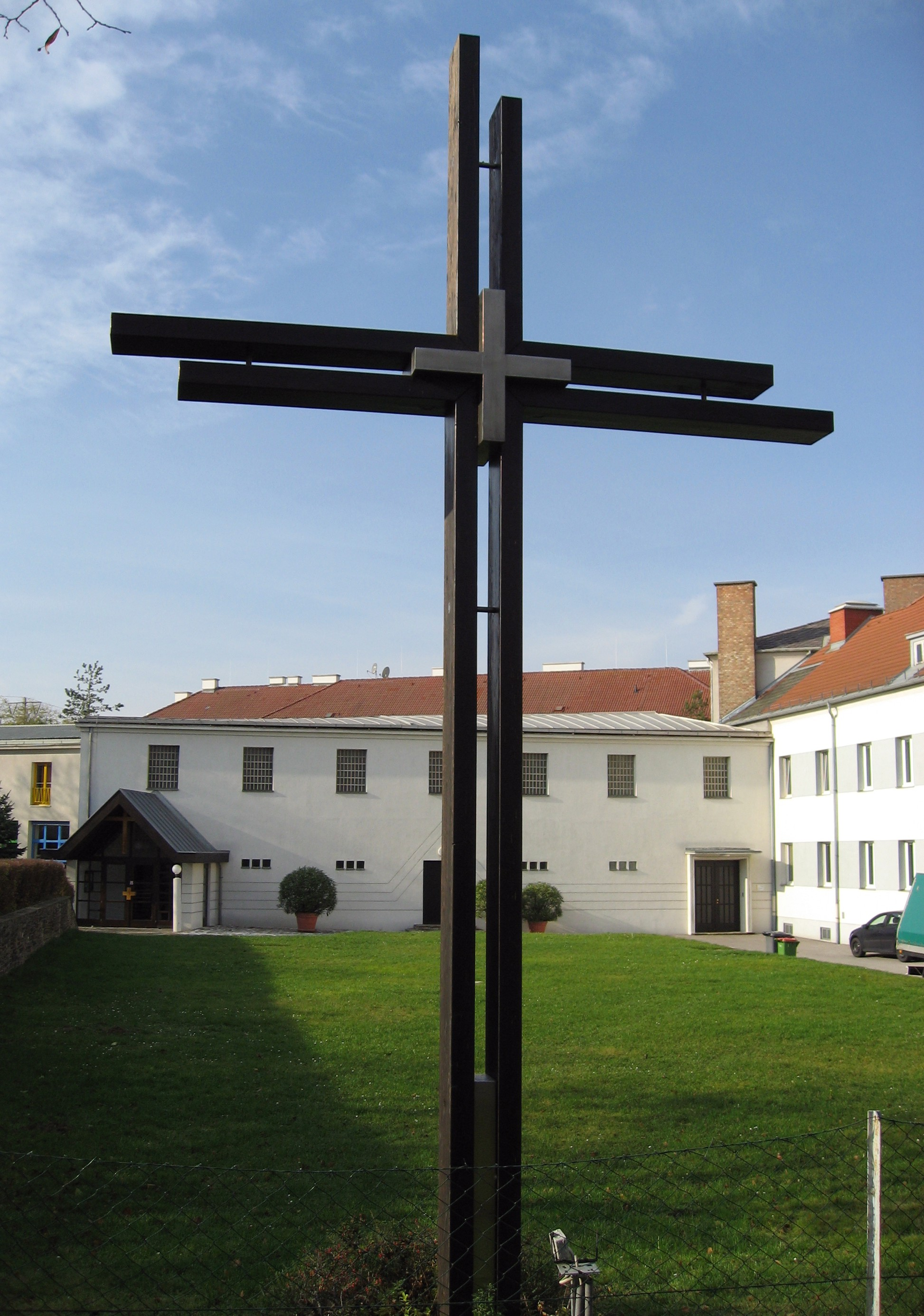 Wien, Pfarrkirche Hasenleiten